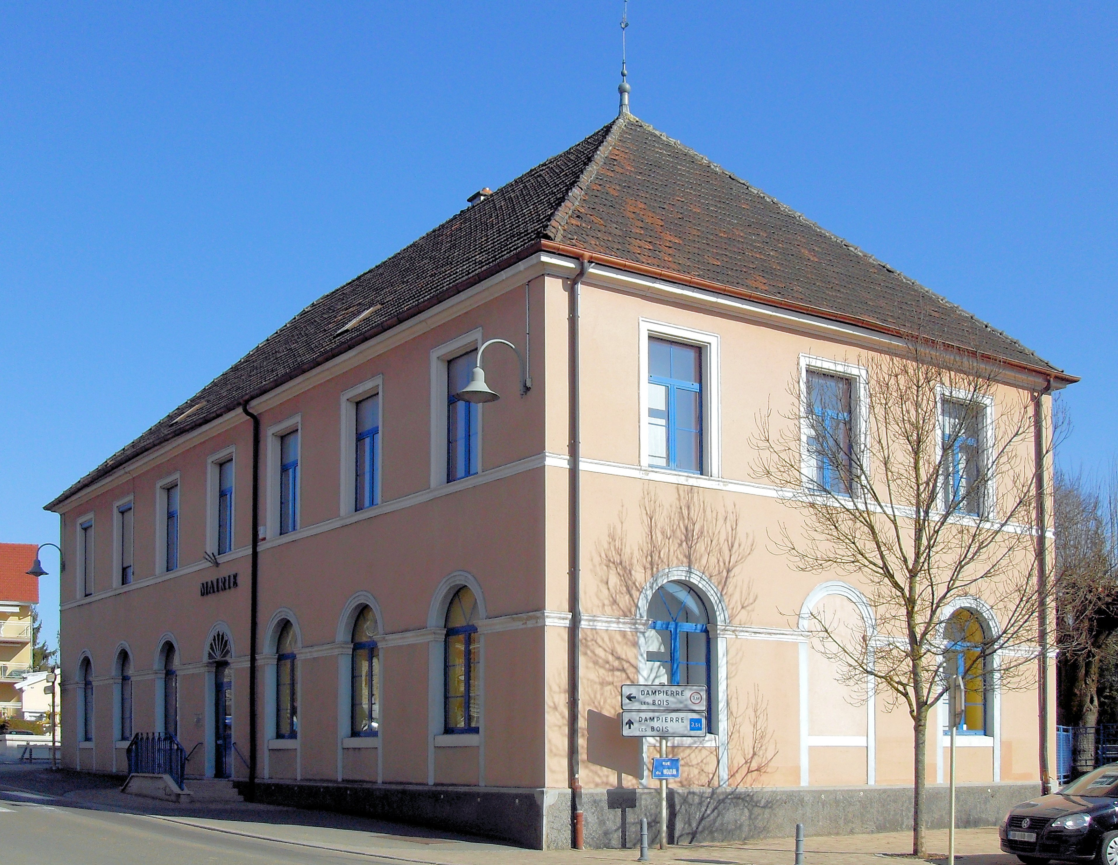 La mairie de Dasle